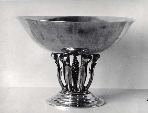 Bowl; Metalwork-Silver